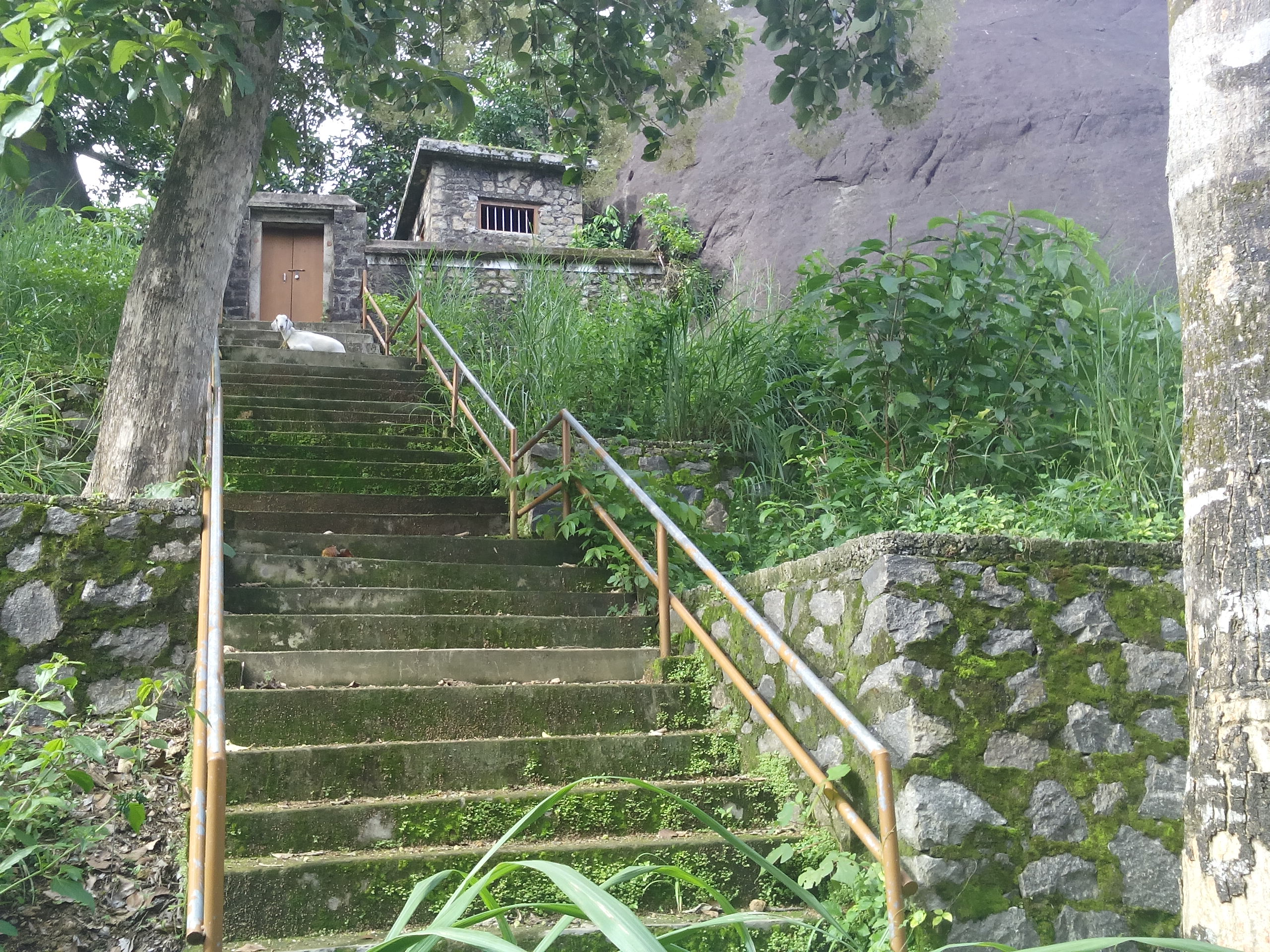 കവിയൂർ ഗുഹാ ക്ഷേത്രം